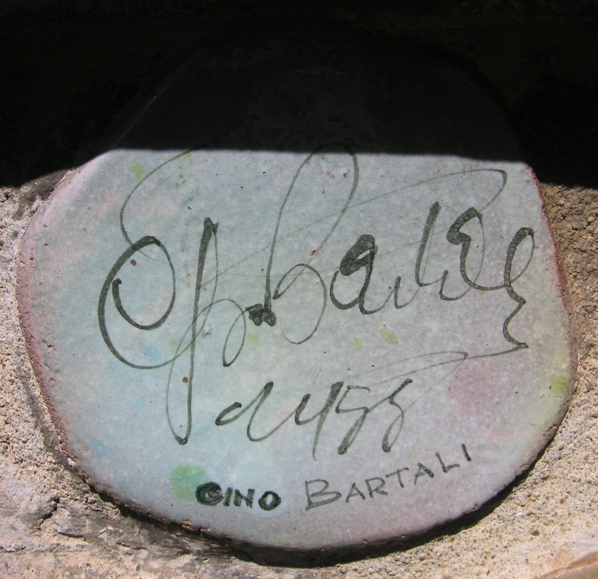 Autografo di Gino Bartali sul muretto di Alassio